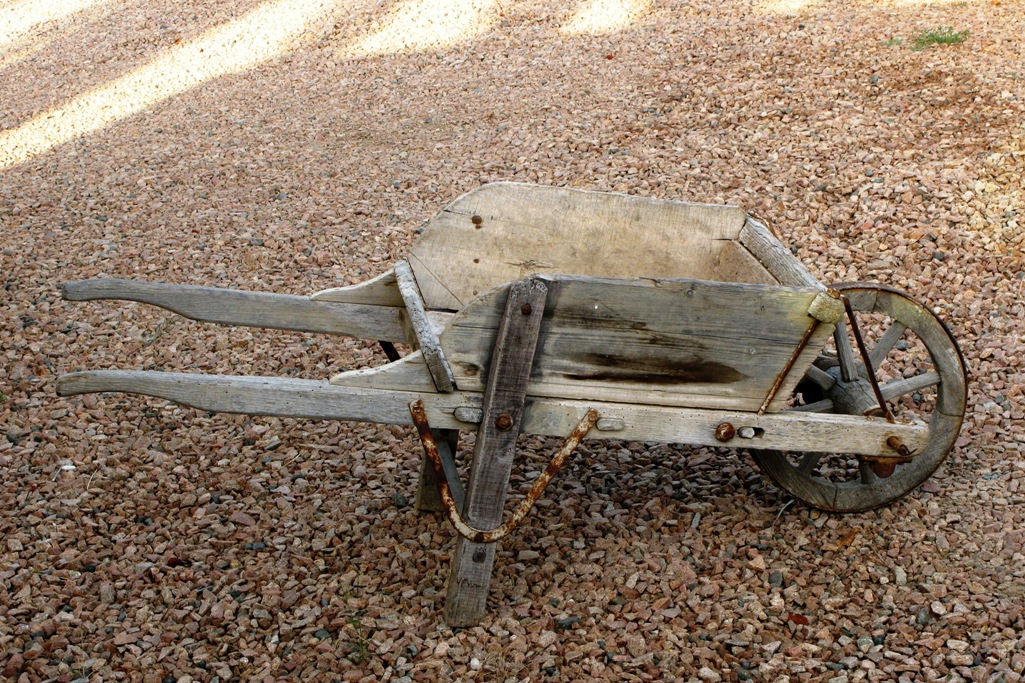 Eng hëlze Schubkar. September 2008.